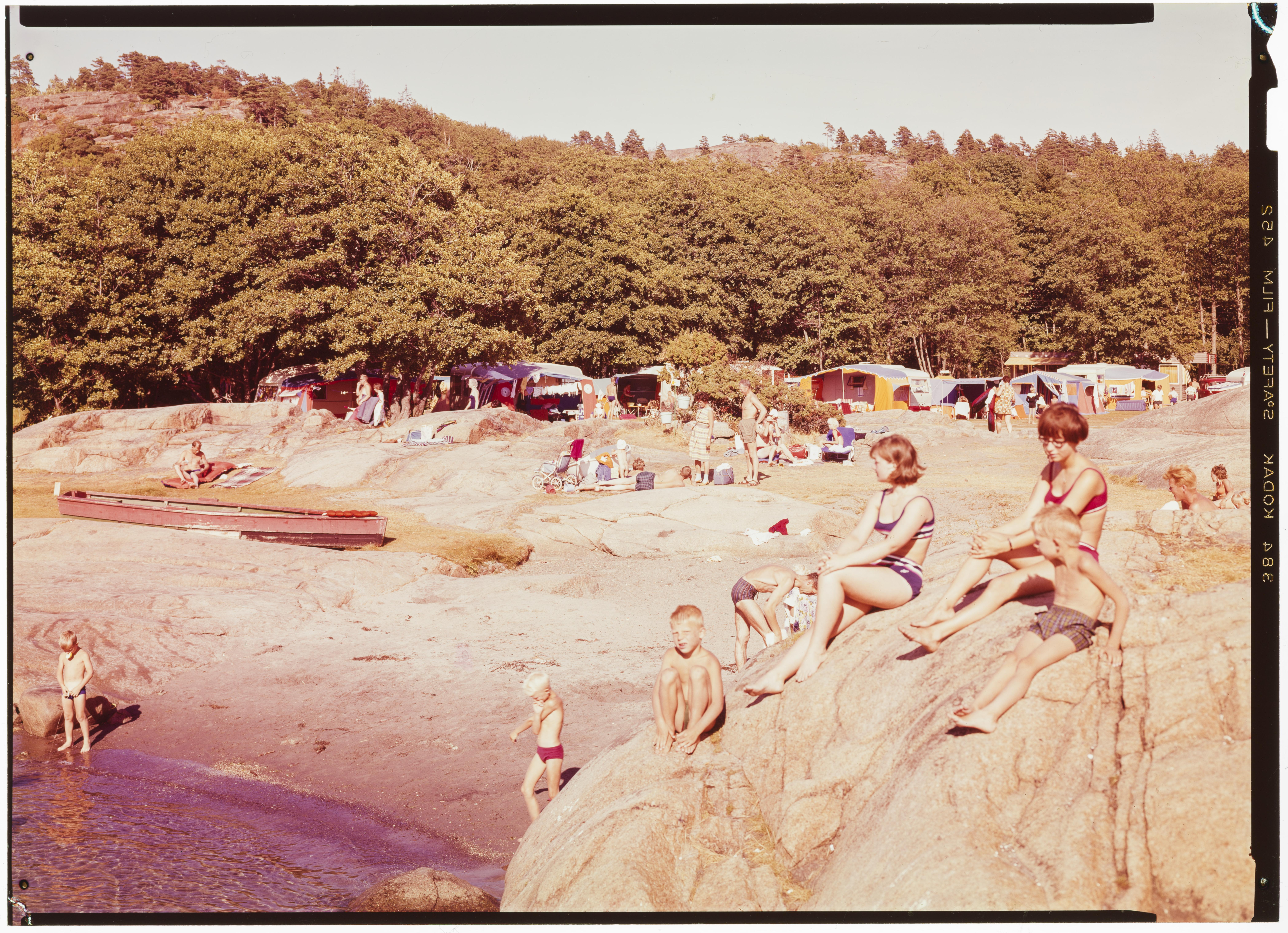 Bildet er hentet fra Nasjonalbibliotekets bildesamling. Anmerkninger til bildet var: Tittel er hentet fra emballasje. Sandefjord,Sandefjordsfjorden, Sandefjord, Vestfold